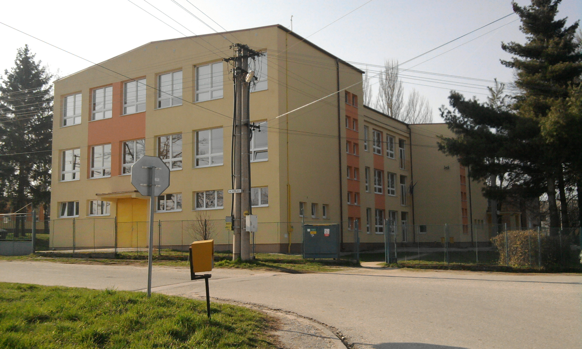 Základná škola v Zbehoch